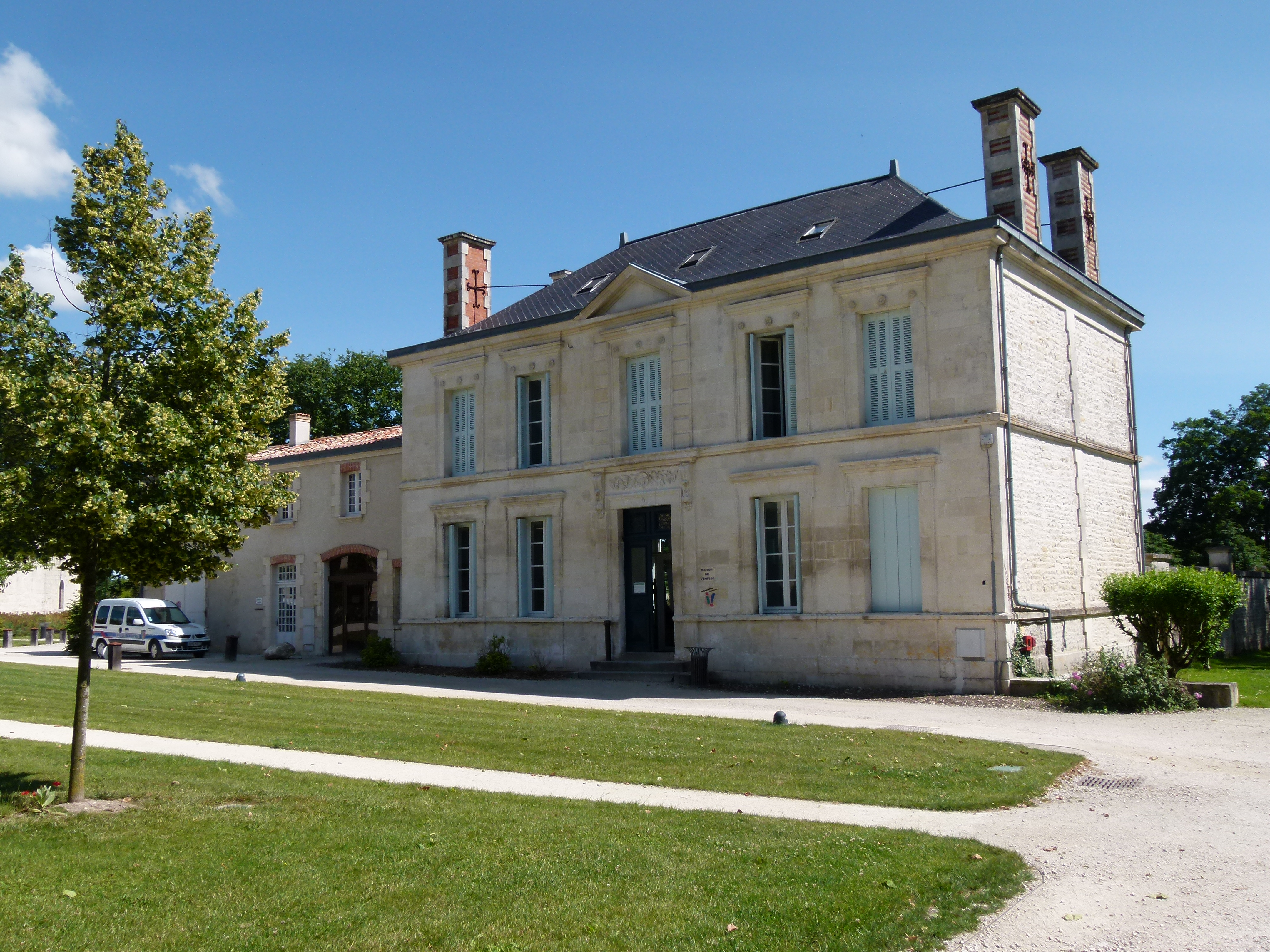 L'ancien presbytère de Surgères, qui est situé à l'intérieur de l'enceinte fortifiée du château de Surgères, a été transformé en Maison de l'Emploi.